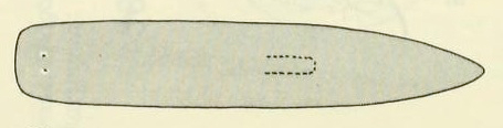 Hymanella retenuova (Platyhelminthes, Tricladida, Planariidae).